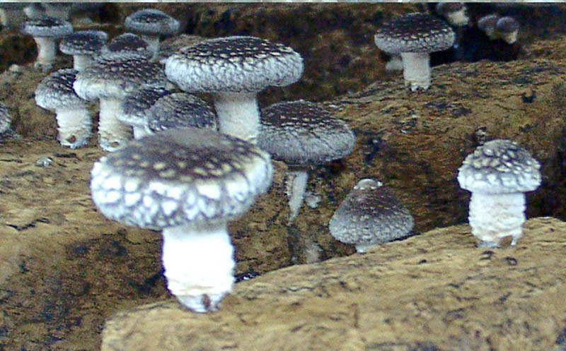 Shiitake mushroom